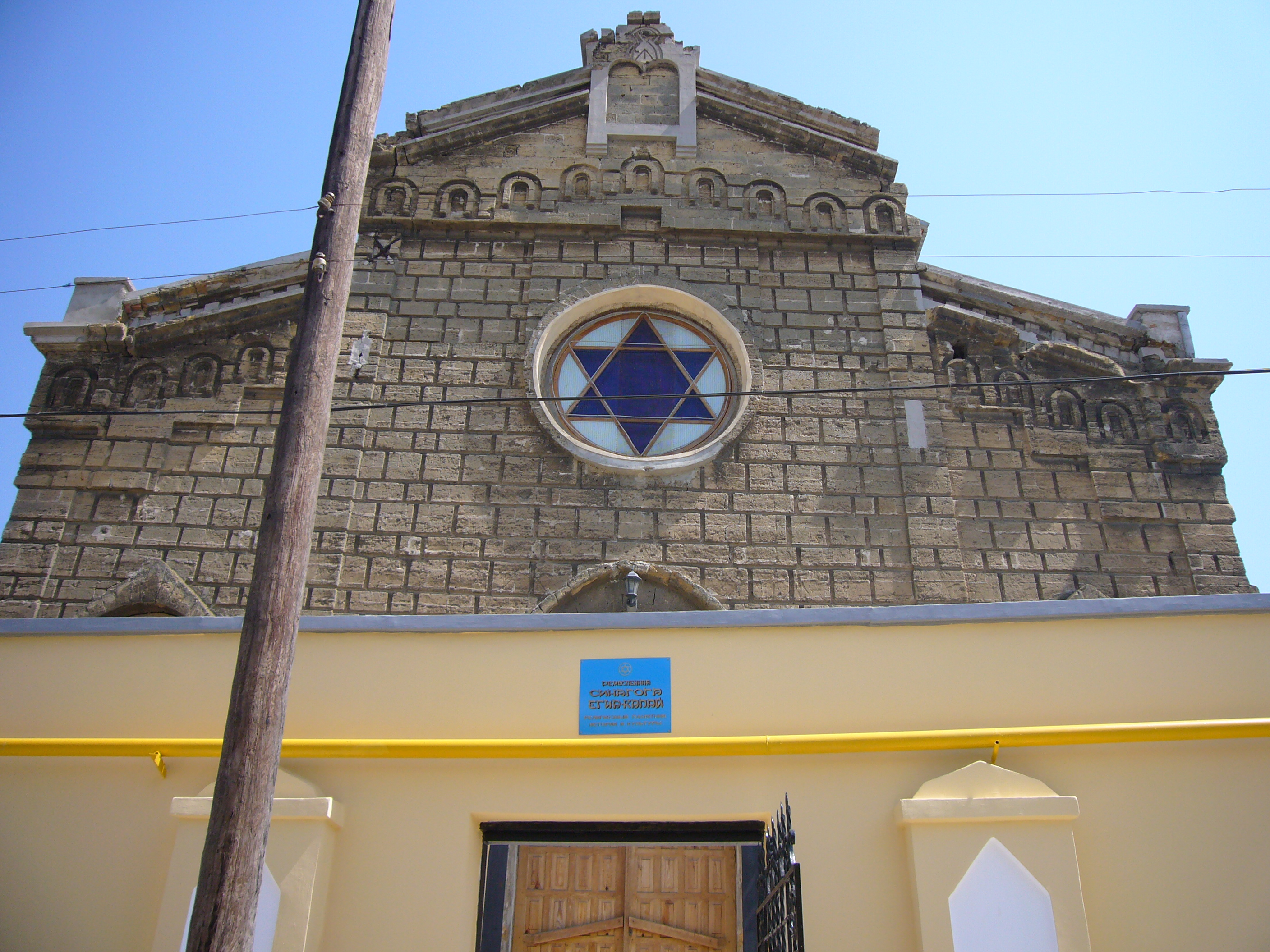 Synagogue Egia Kapay in Eupatoria, Crimea, Ukraine. Built in 1912. / Ремесленная синагога Егия-Капай в Евпатории (АР Крым, Украина). Построена в 1912 г.